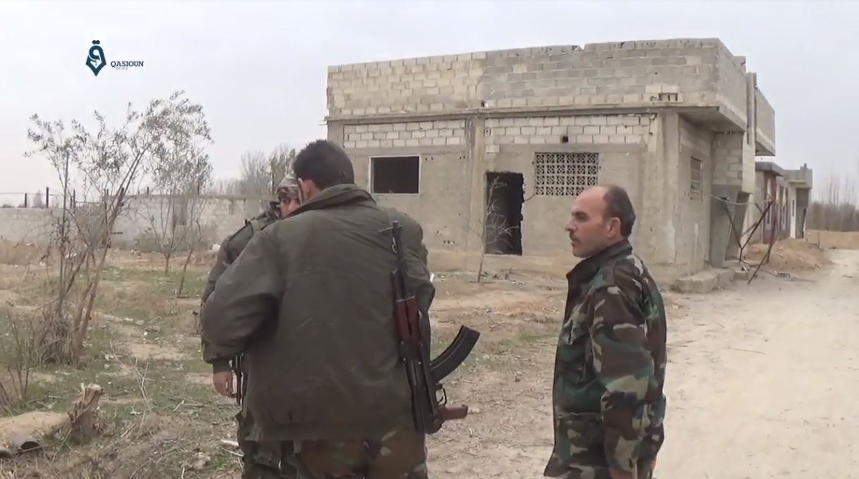 Rebelles de Jaych al-Islam à al-Marj, dans la Ghouta orientale, lors de la guerre civile syrienne, le 13 février 2017.